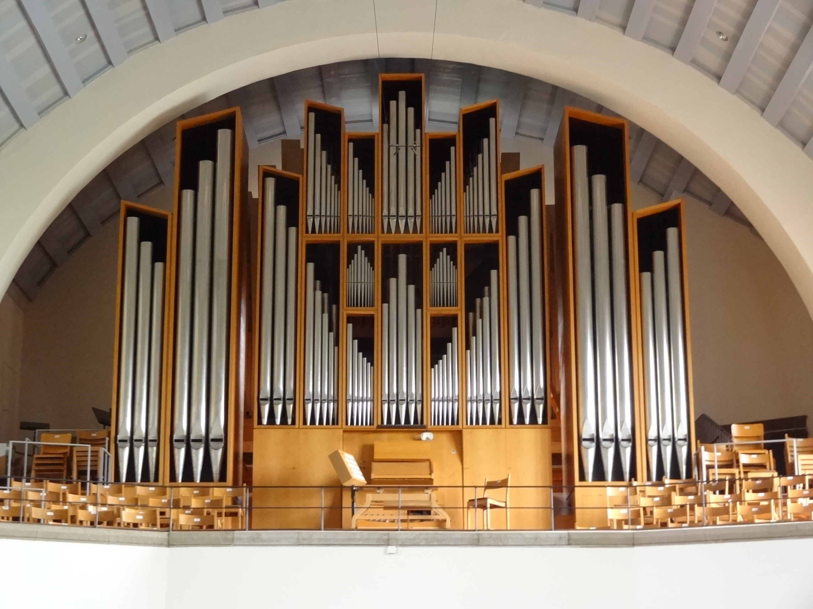 Pauluskirche_(Darmstadt)